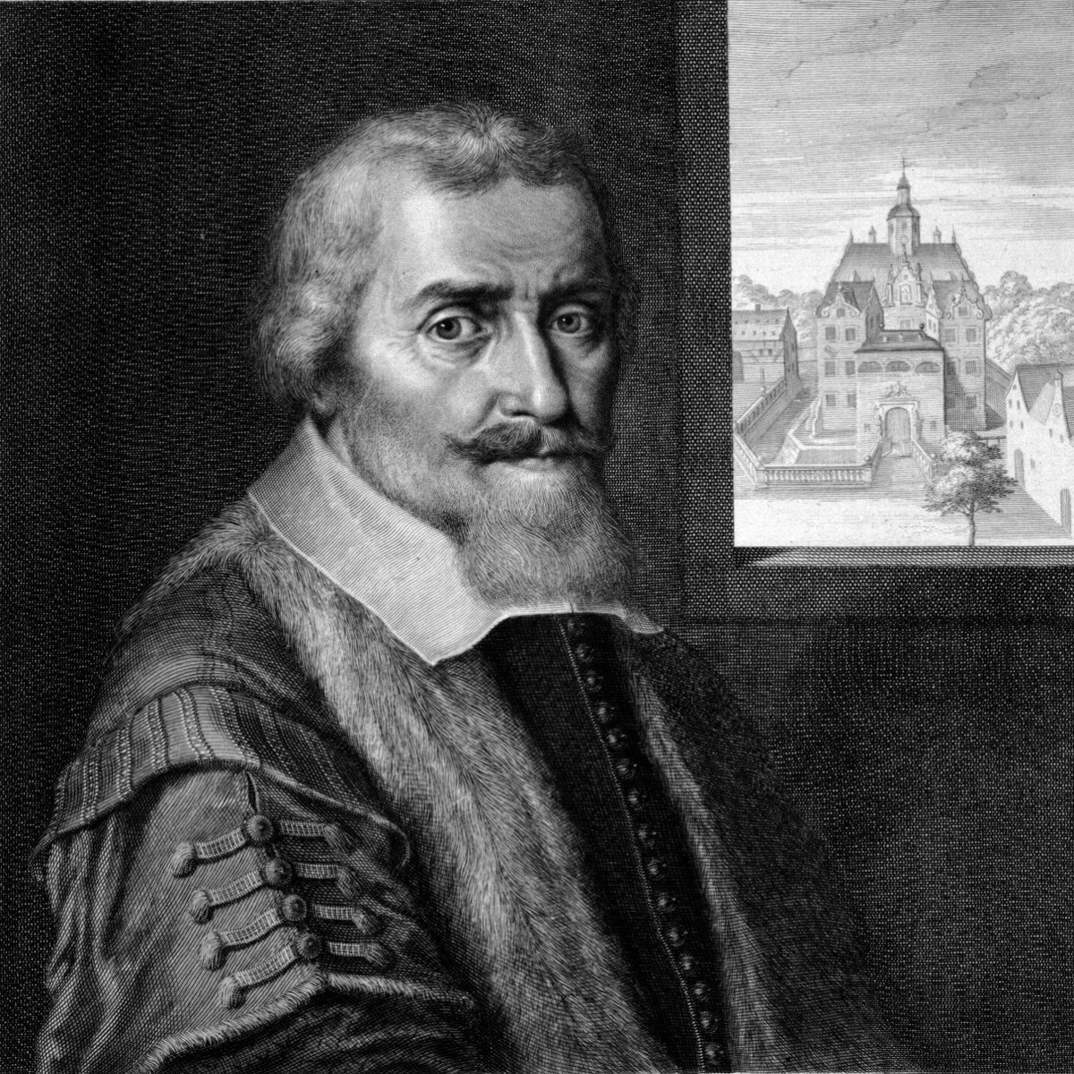 Georg Winckler, Besitzer von Schloss Dölitz